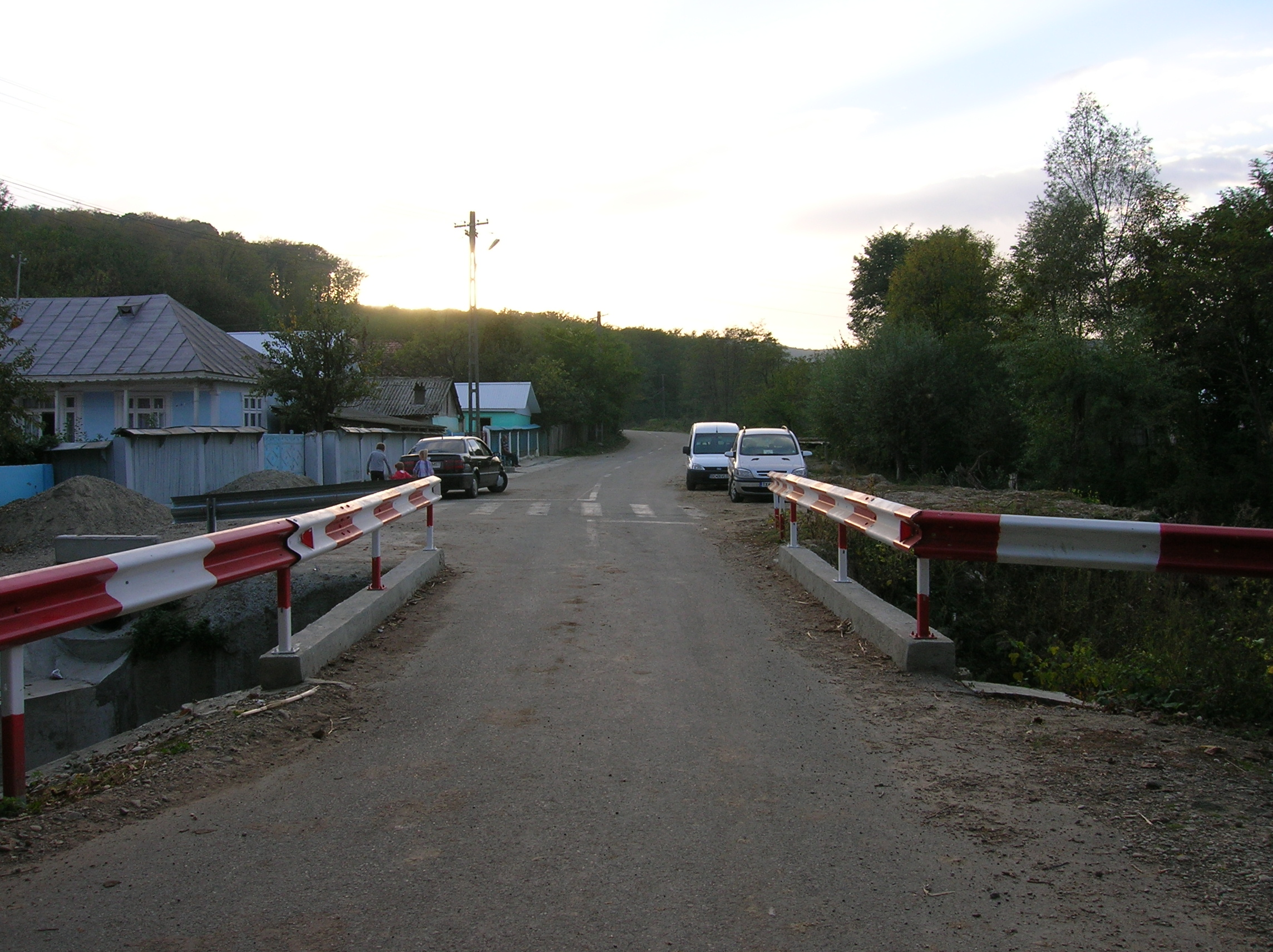 Comuna Valea Seacă Bacău - Satul Pălămida - podul dinspre pădure de la capătul satului